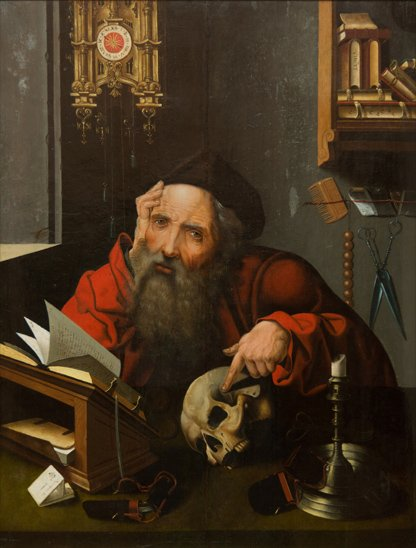 Св. Иероним в келье. Иос ван Клеве (?). Смоленская художественная галерея